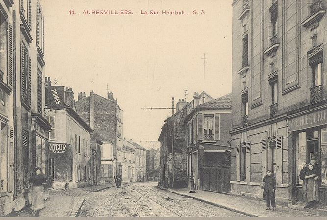 Rue Heurtault, à Aubervilliers.[La rue à gauche est la rue Edgar-Quinet. Rails de tram.